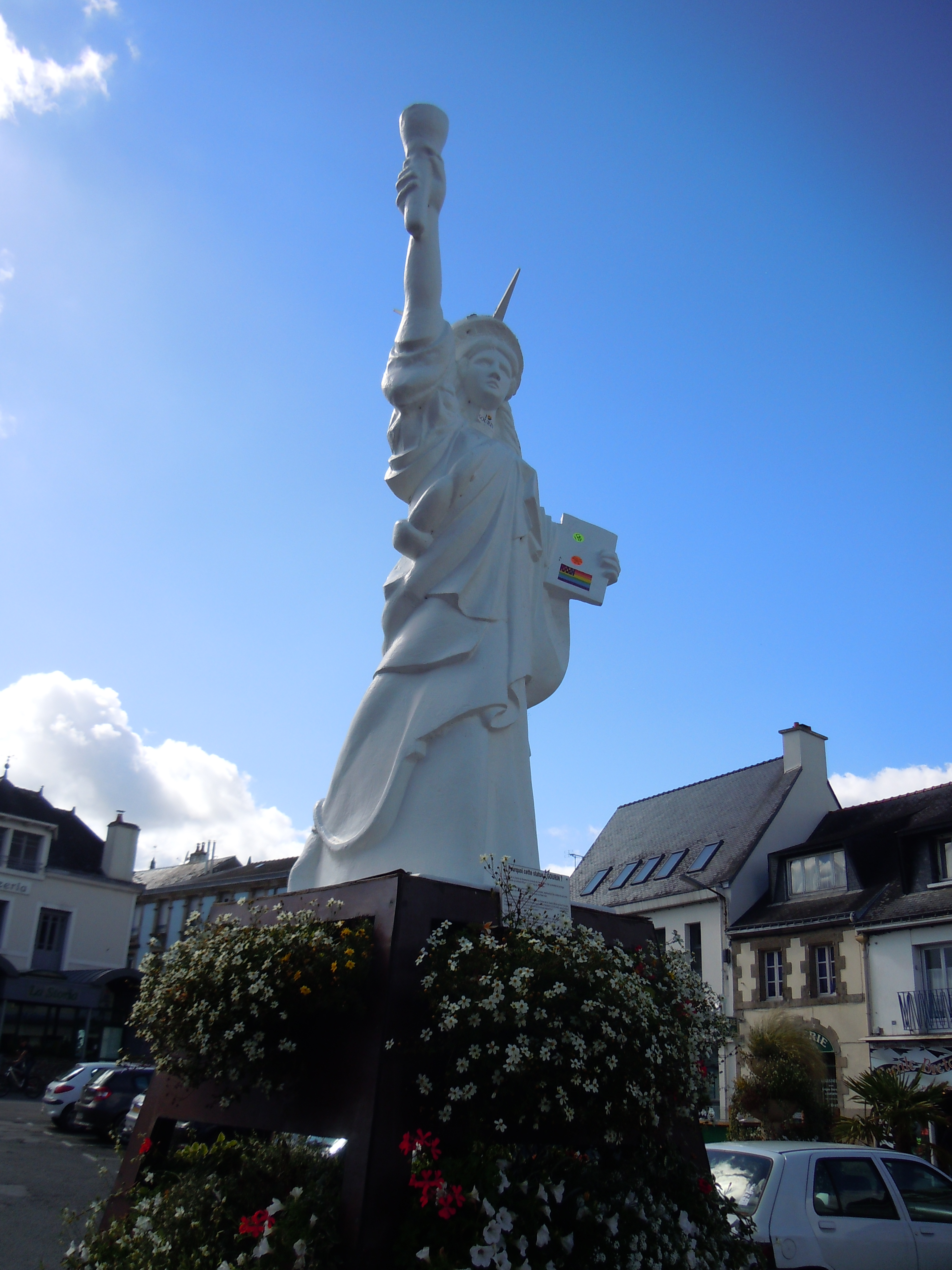 réplique de la statue de la Liberté de Gourin dans le département du Morbihan